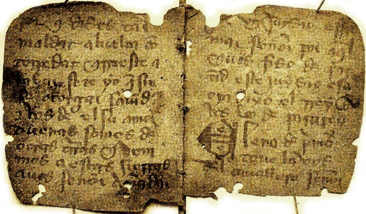 Manuscrito del poema de Elena y María, ms. 86 de la Biblioteca de la Duquesa de Alba, 66 x 55 mm. aprox. Fundación Casa de Alba, Palacio de Liria.